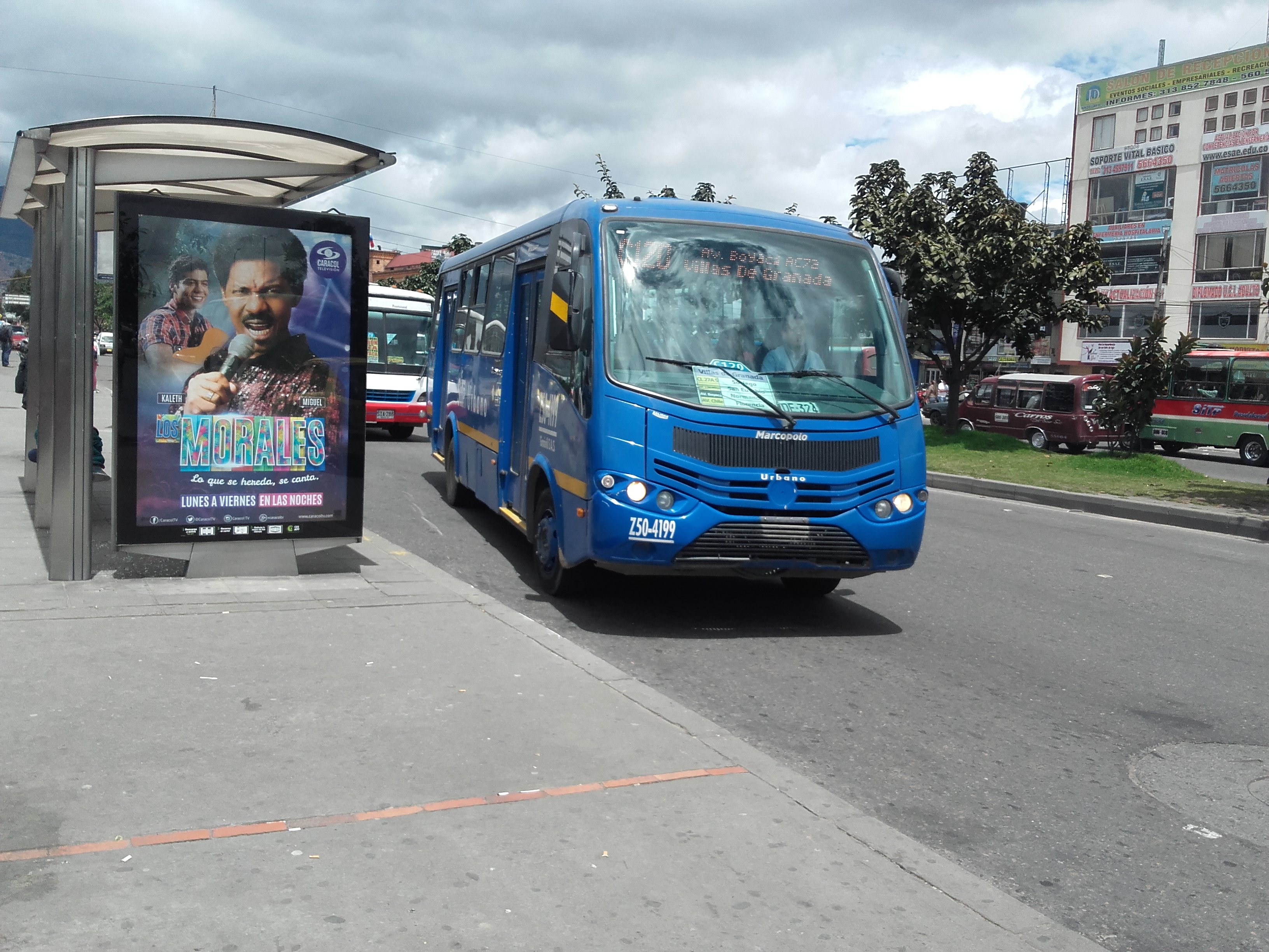 cmgmgmgmgmmhmgn